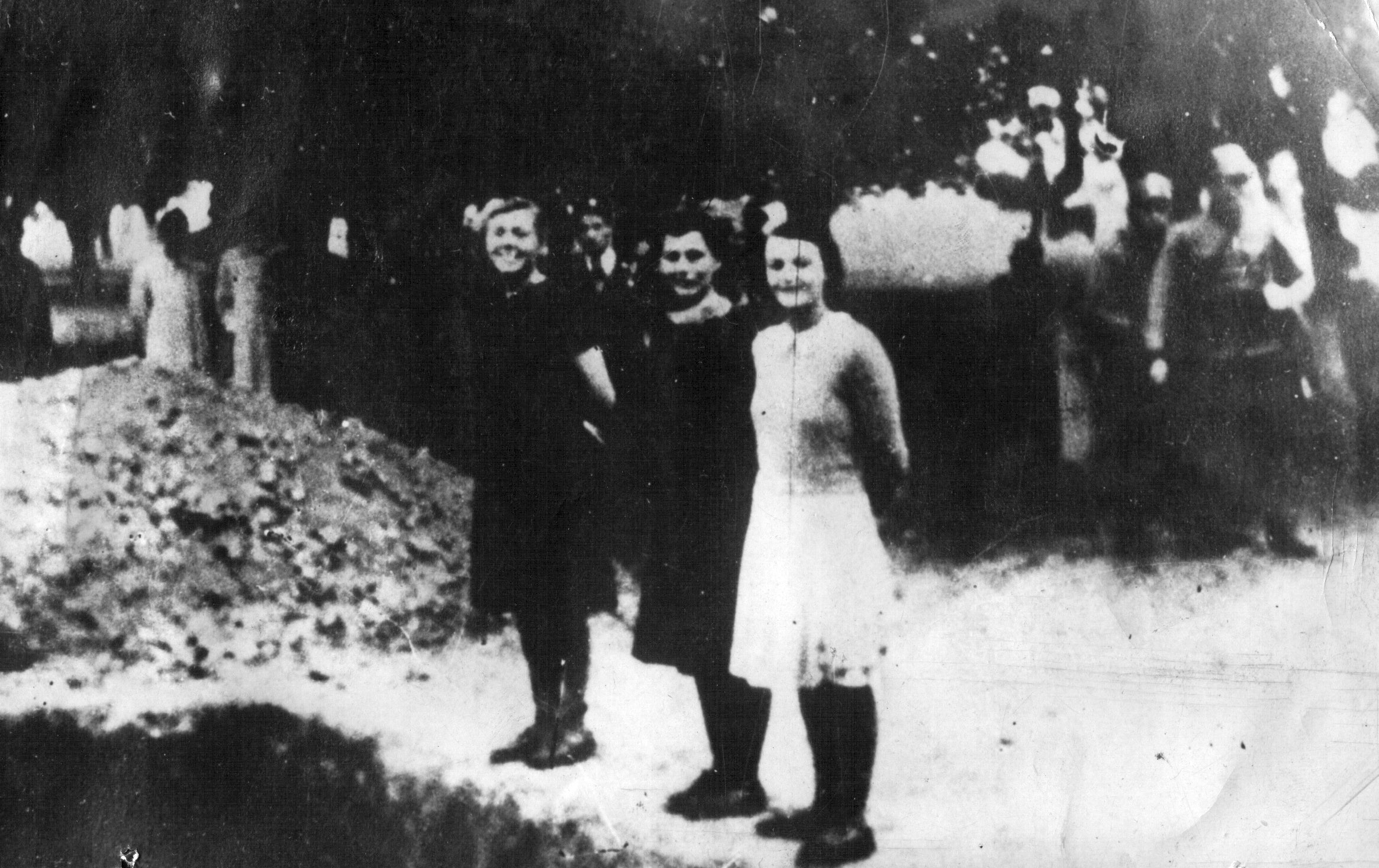 Srpskohrvatski / српскохрватски: Tri omladinke u Zagrebu stoje pred svojom rakom, svezanih ruku, i smeju se u času kad će ih streljati.